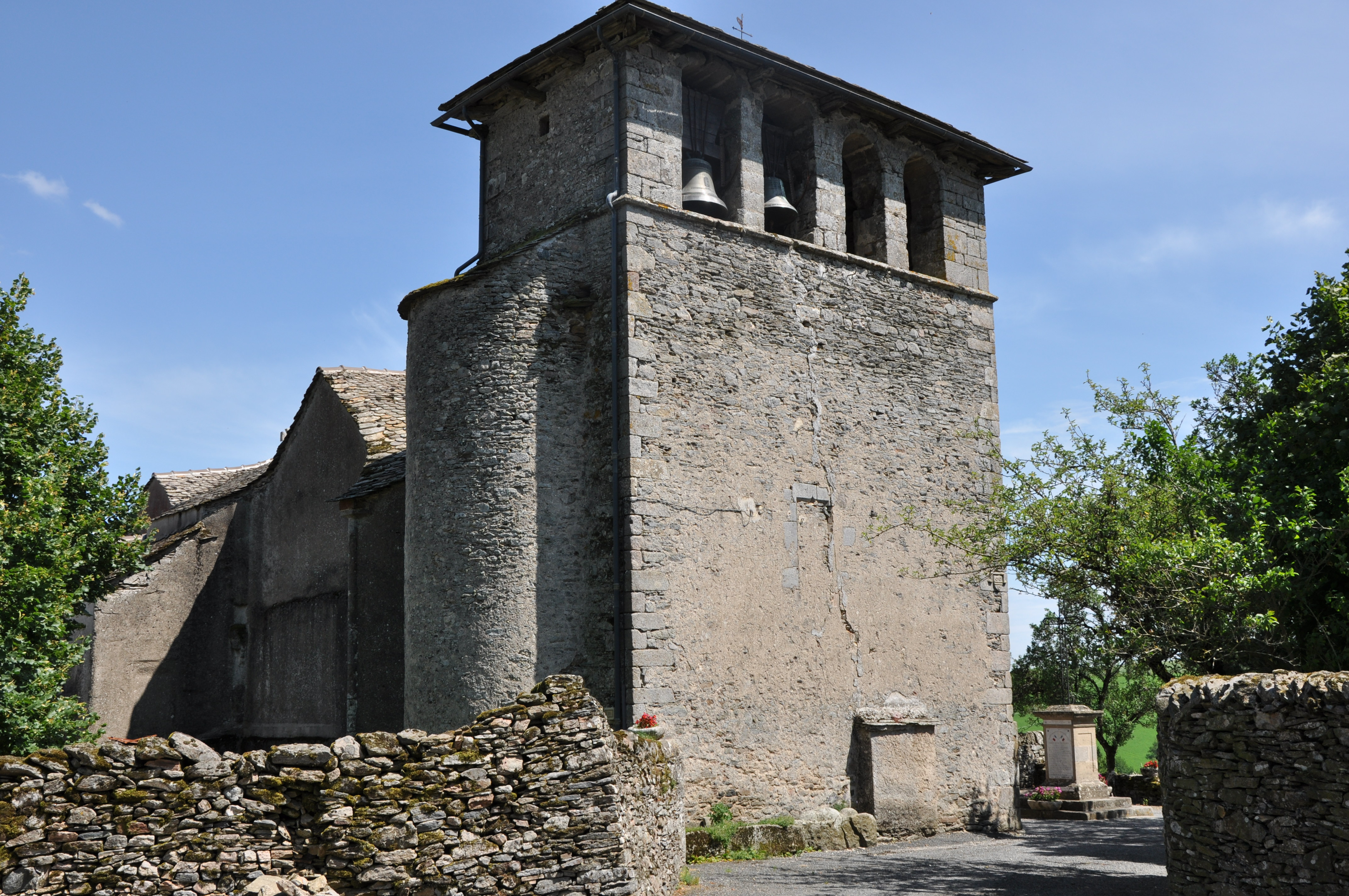 Vue générale de l'église de Saint-Martin des Cormières sur la commune du Vibal, levezou, Aveyron